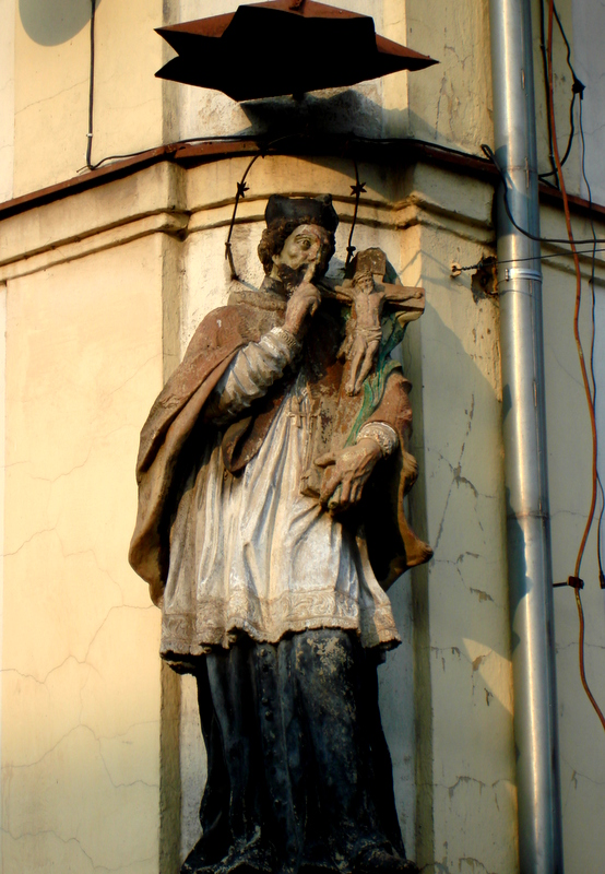 ratusz, 1726, XIX Lubawka, Lubawka 05.1981.